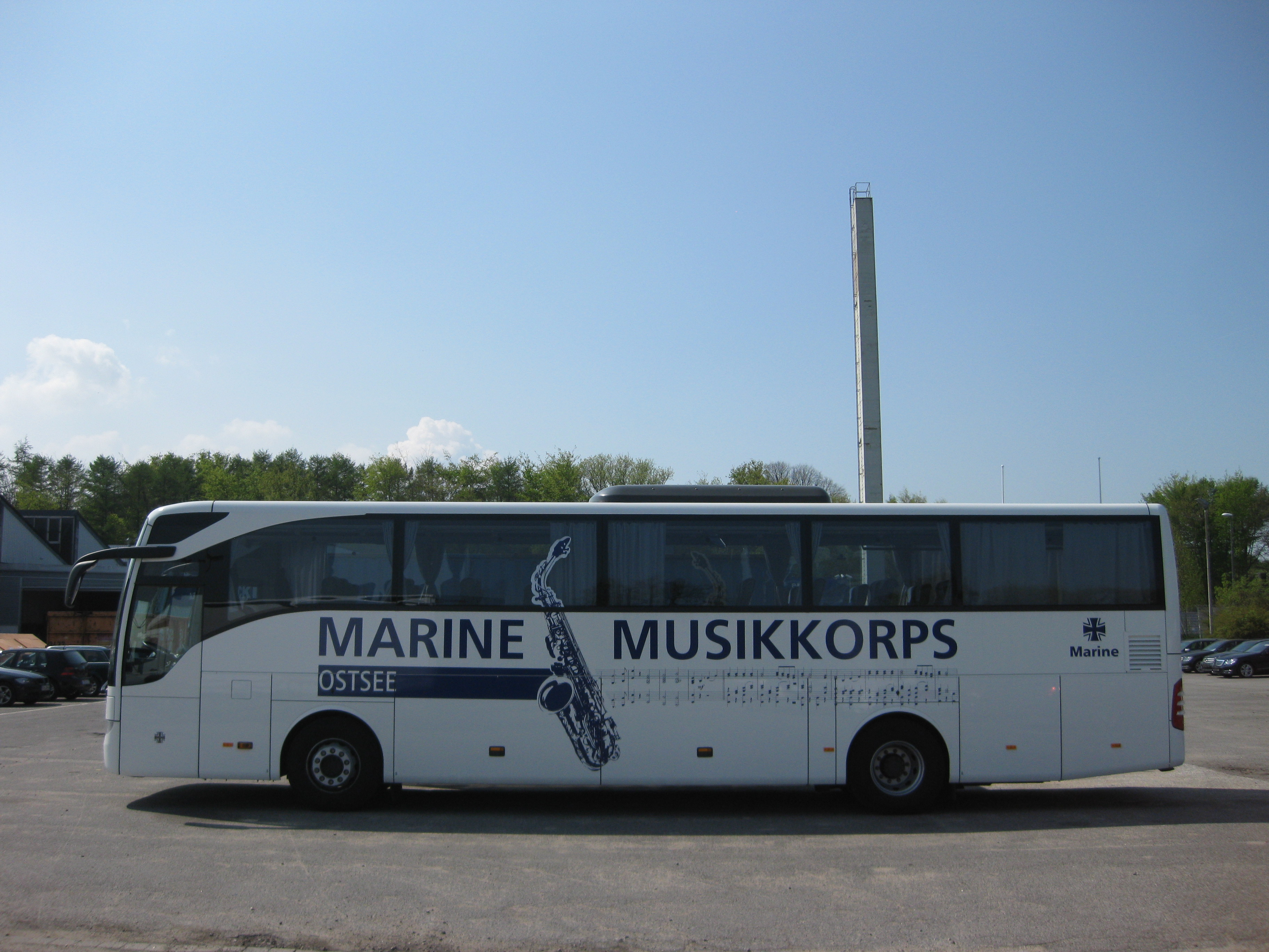 "Mannschaftsbus" des Marinekorps Ostsee